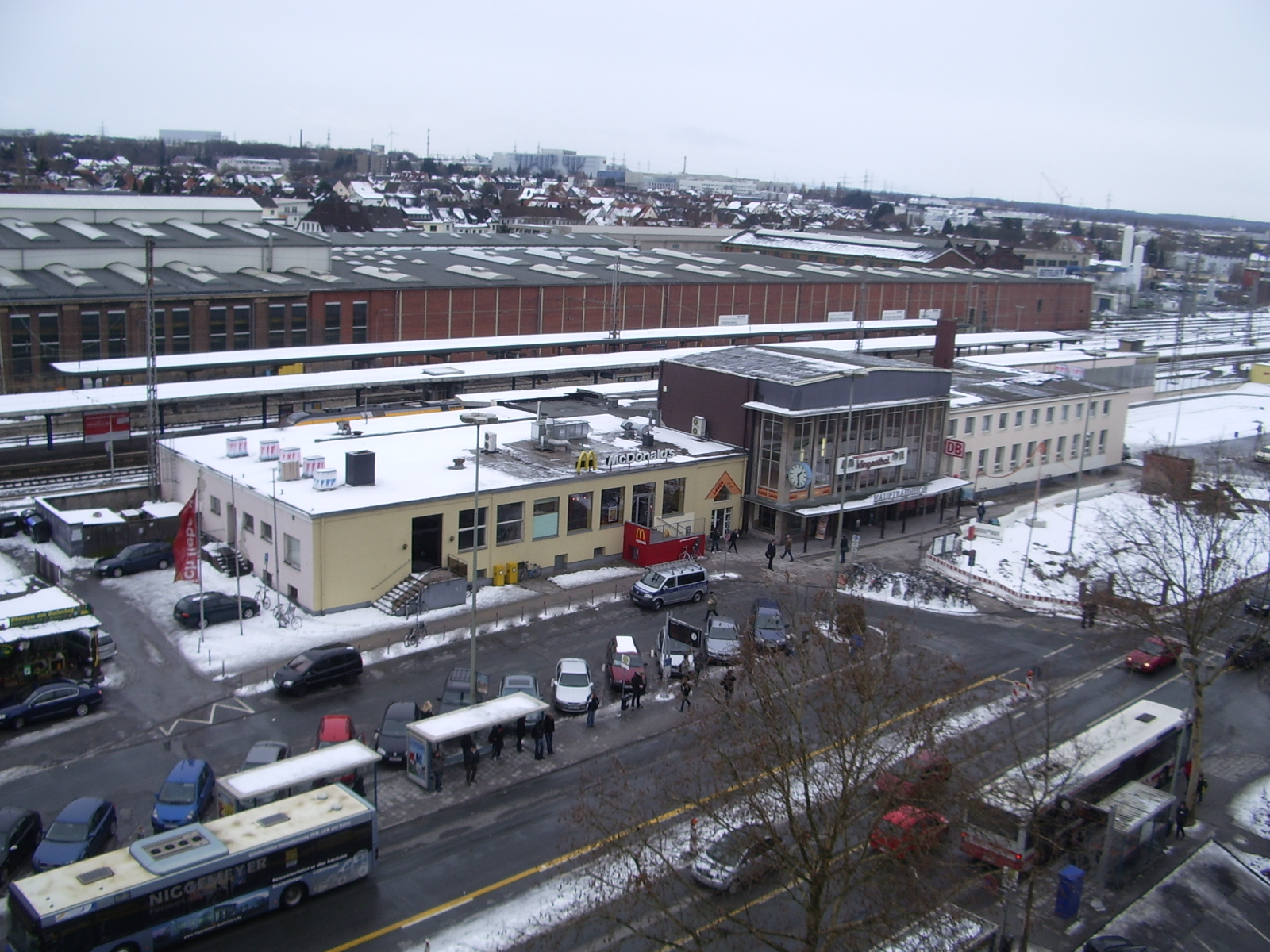 Paderborn Hauptbahnhof im Februar 2010, fotografiert von der gegenüberliegenden Agentur für Arbeit aus. Die Bauarbeiten zum Ausbau der Bahnhofstraße haben, von Westen (rechts im Bild) kommend, den Bereich vor dem Haupteingang zum Bahnhofsgebäude erreicht.